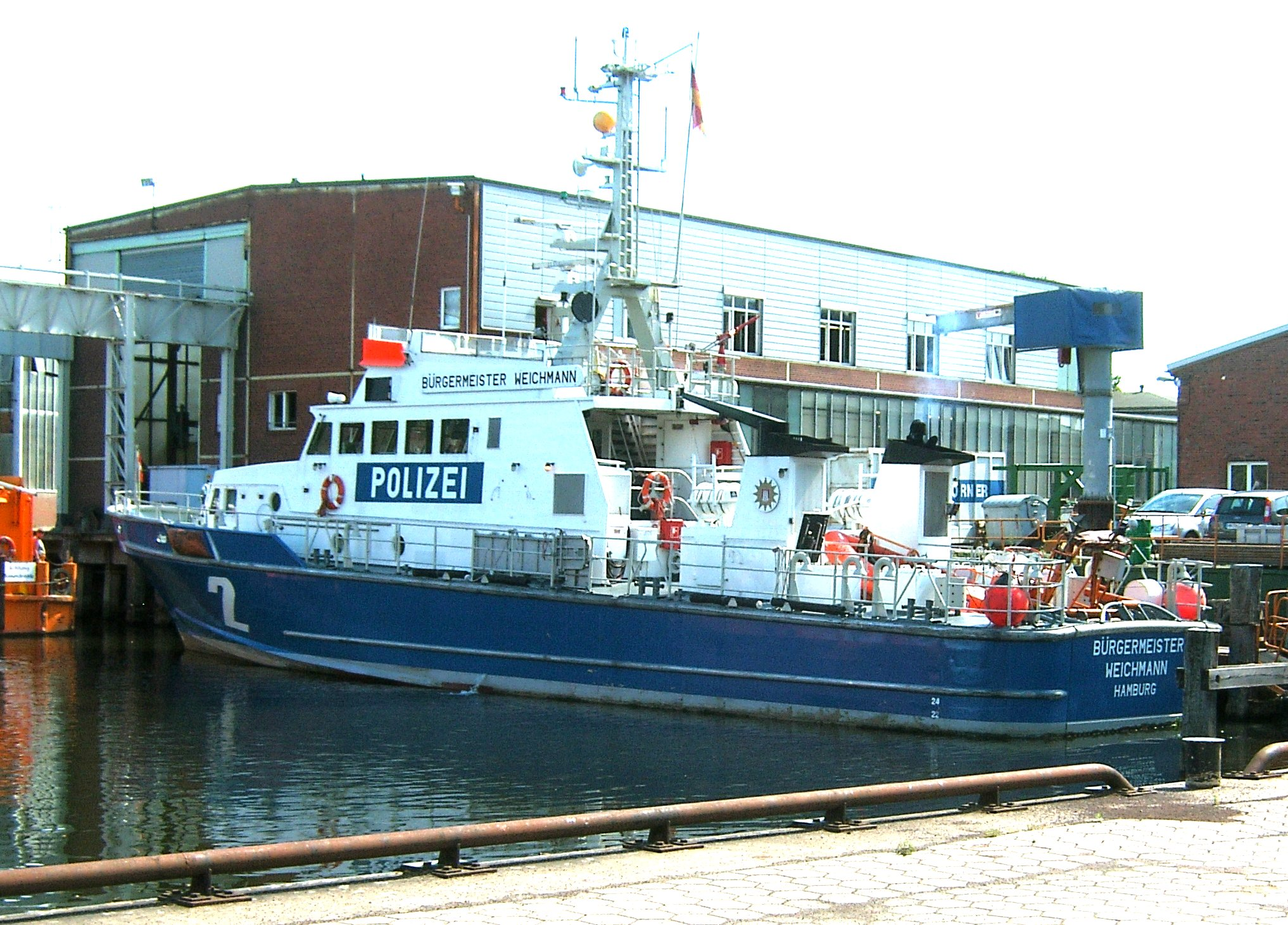 Bildbeschreibung: Hamburg, Harburg, Wasserschutzpolizei Fotograf: selbst Datum: 12.7.2006